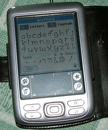 自用的Palm Zire 72型掌上电脑（PDA） 这是一款Palmone公司于2004年出品的掌上电脑（PDA），屏幕上显示的是Graffiti2的输入规则。需要说明的是，这一款Zire 72出厂时的颜色是蓝色的，但因为容易掉漆，而且已经开始掉漆，被我把蓝色的漆刮掉了。--金色葡萄 15:55 2004年9月10日 (UTC)